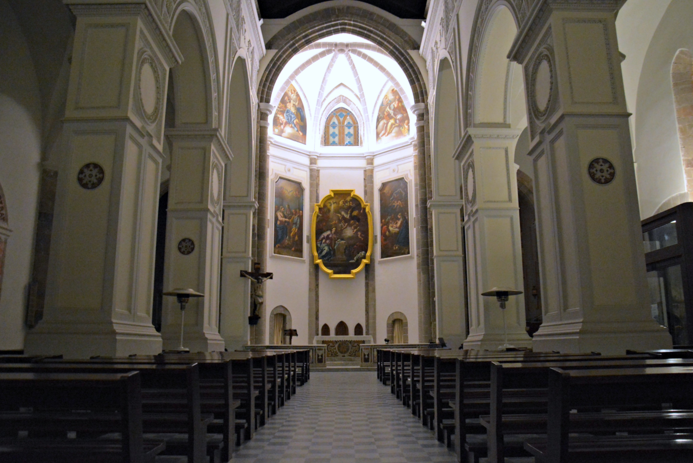 Vedi titolo